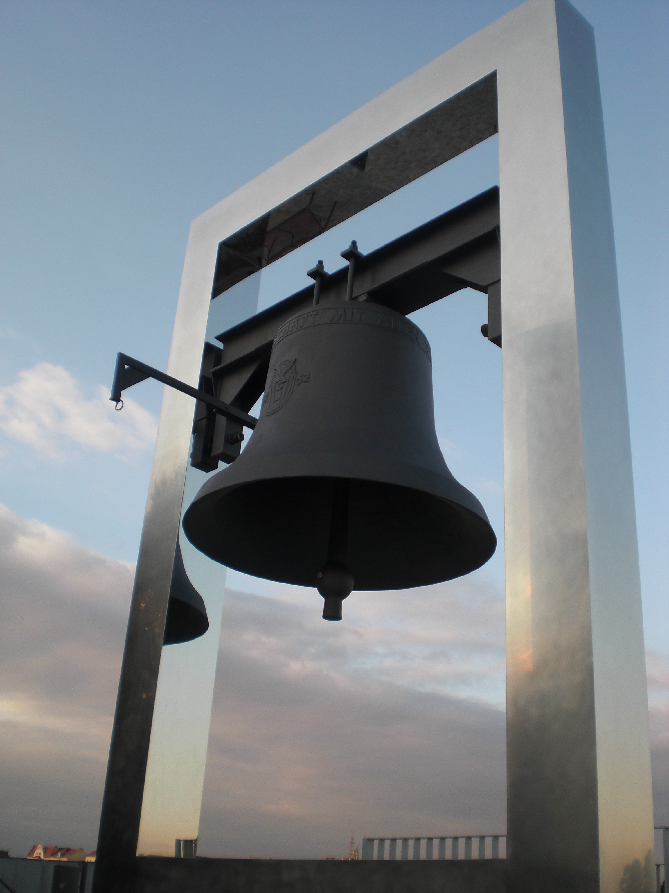 Friedensglocke, Frankfurt an der Oder, 2011